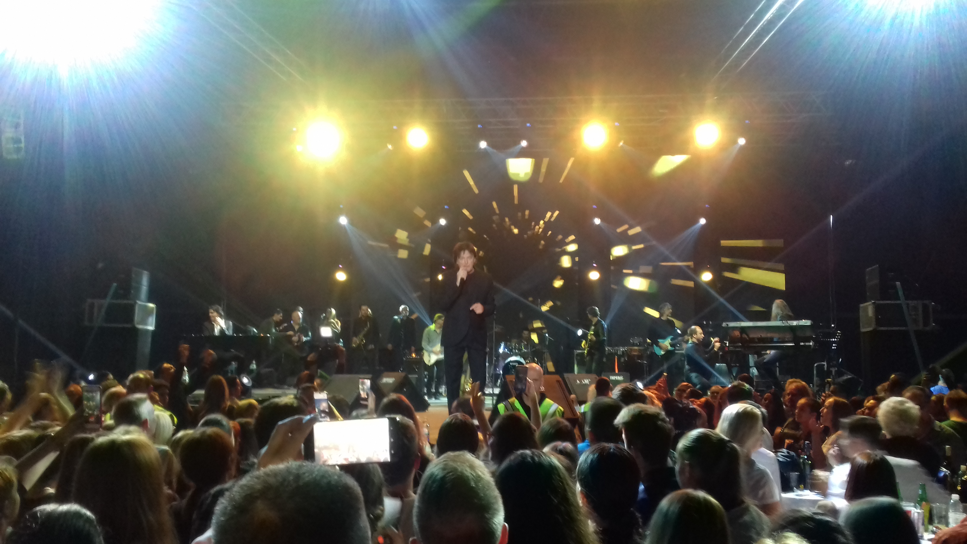 С трећег концерта Здравка Чолића у Зеничкој арени